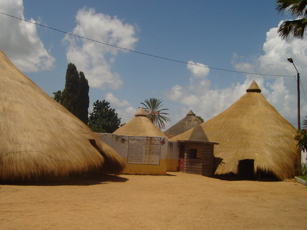 Palais du chef traditionnel(Lamido) de Ngaoundere